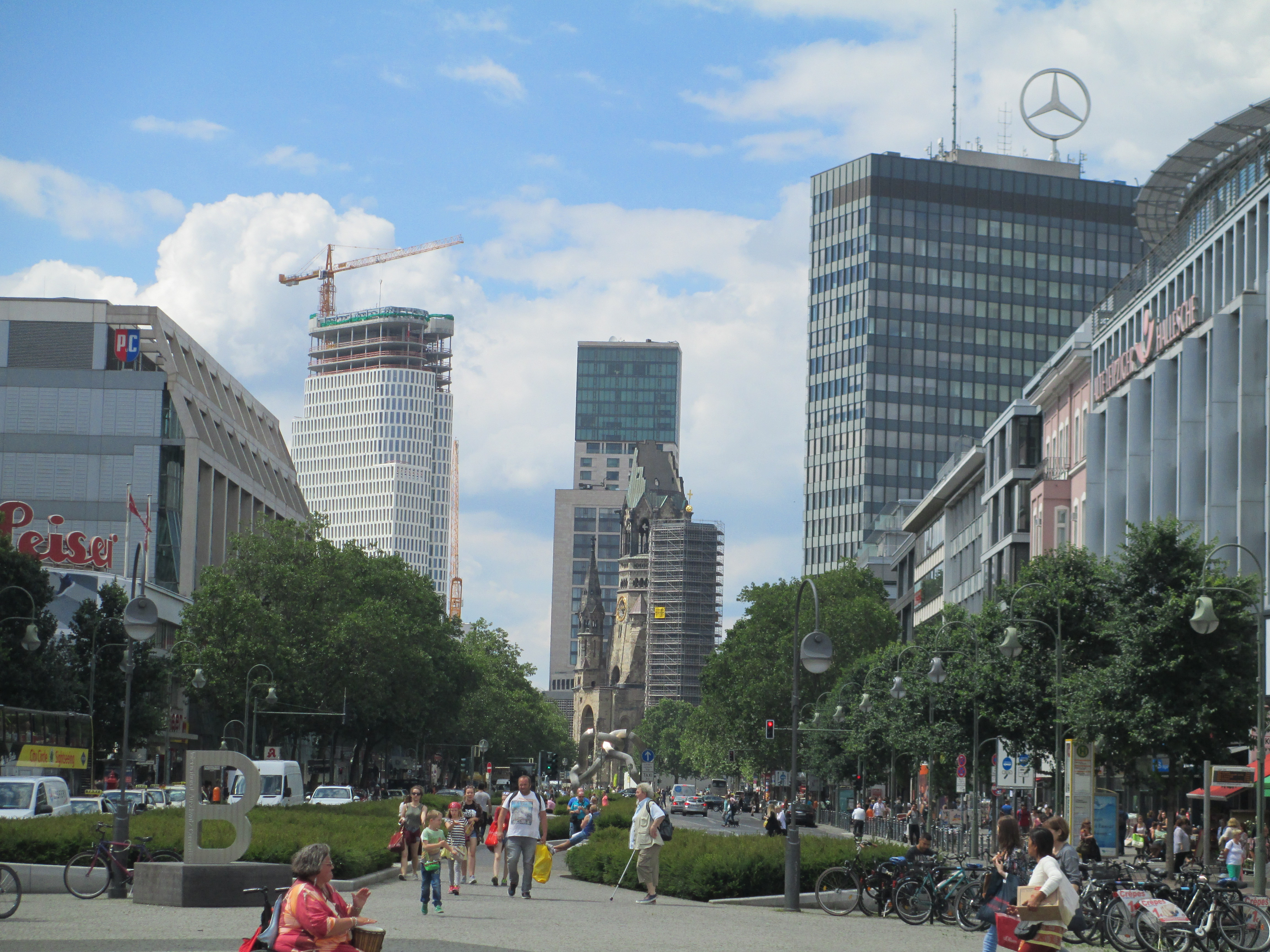 שדרות טאואנציינשטראסה בברלין